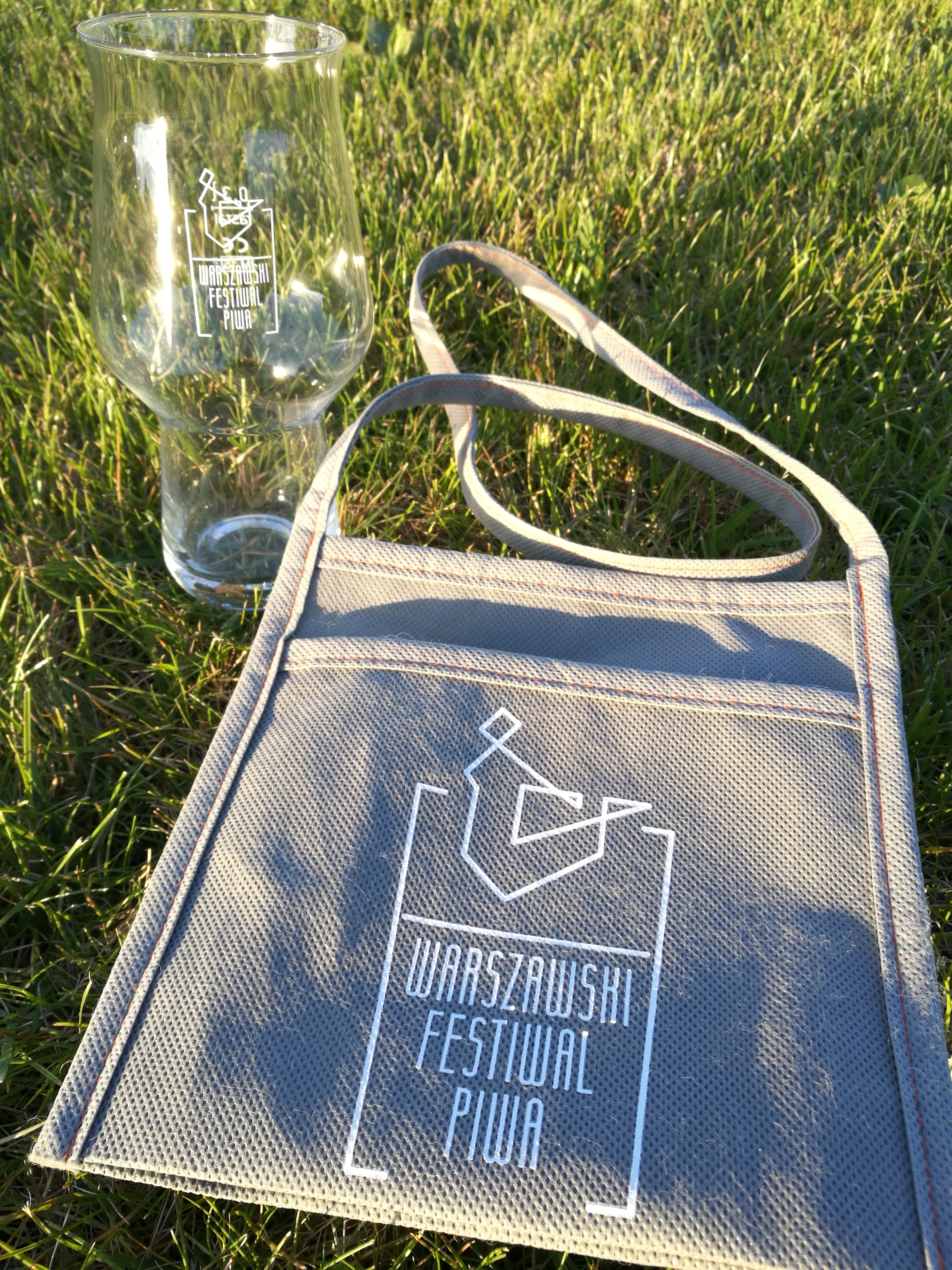 Warsaw Beer Festiwal